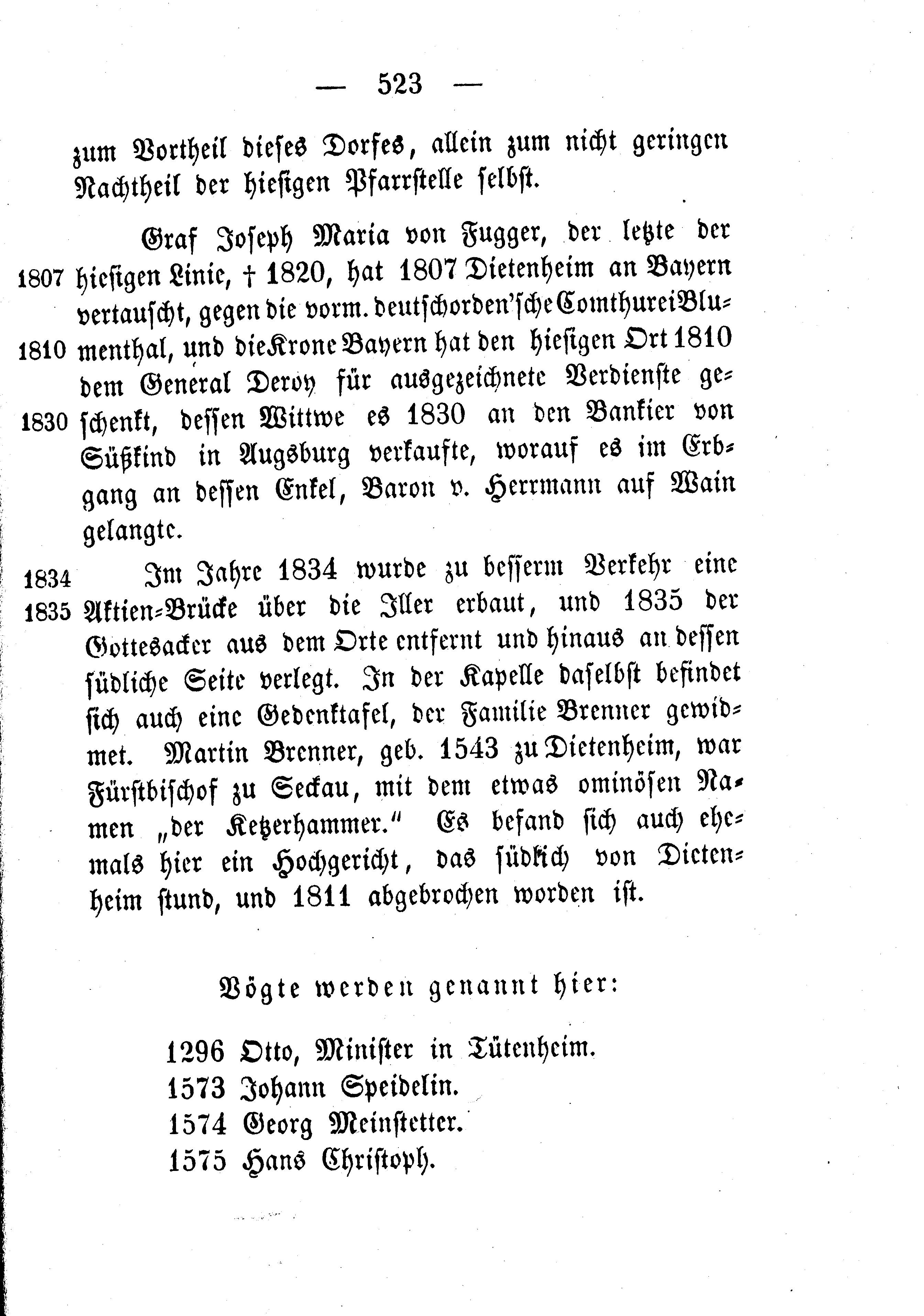 Ferdinand Eggmann, Geschichte des Illertales